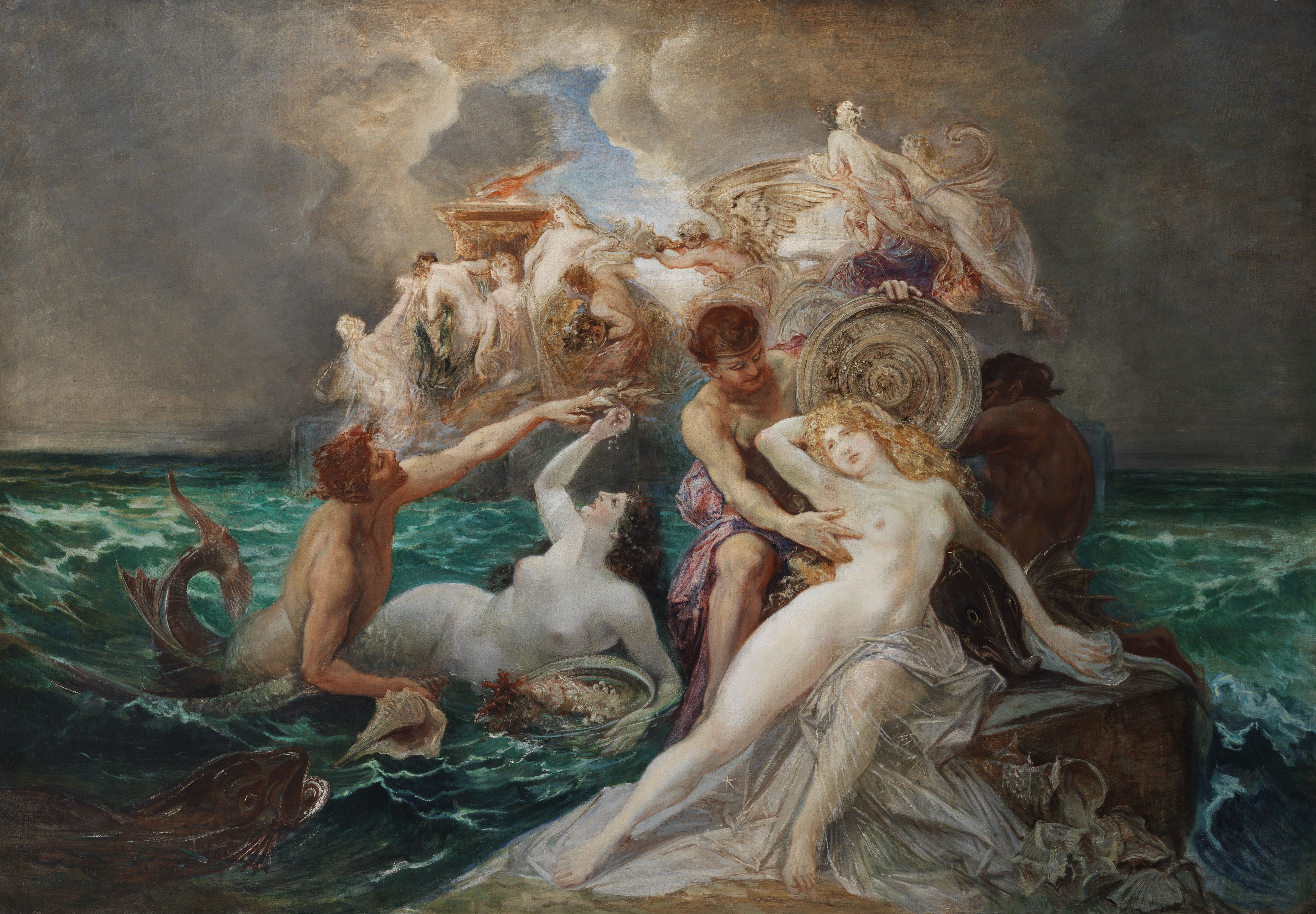 Poseidon und die Nereiden. Öl auf Leinwand. 132 x 191 cm.